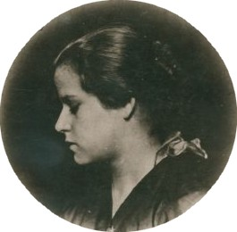 Jožka Jabůrková (1896 - 1942), Československá levicová novinářka a spisovatelka.